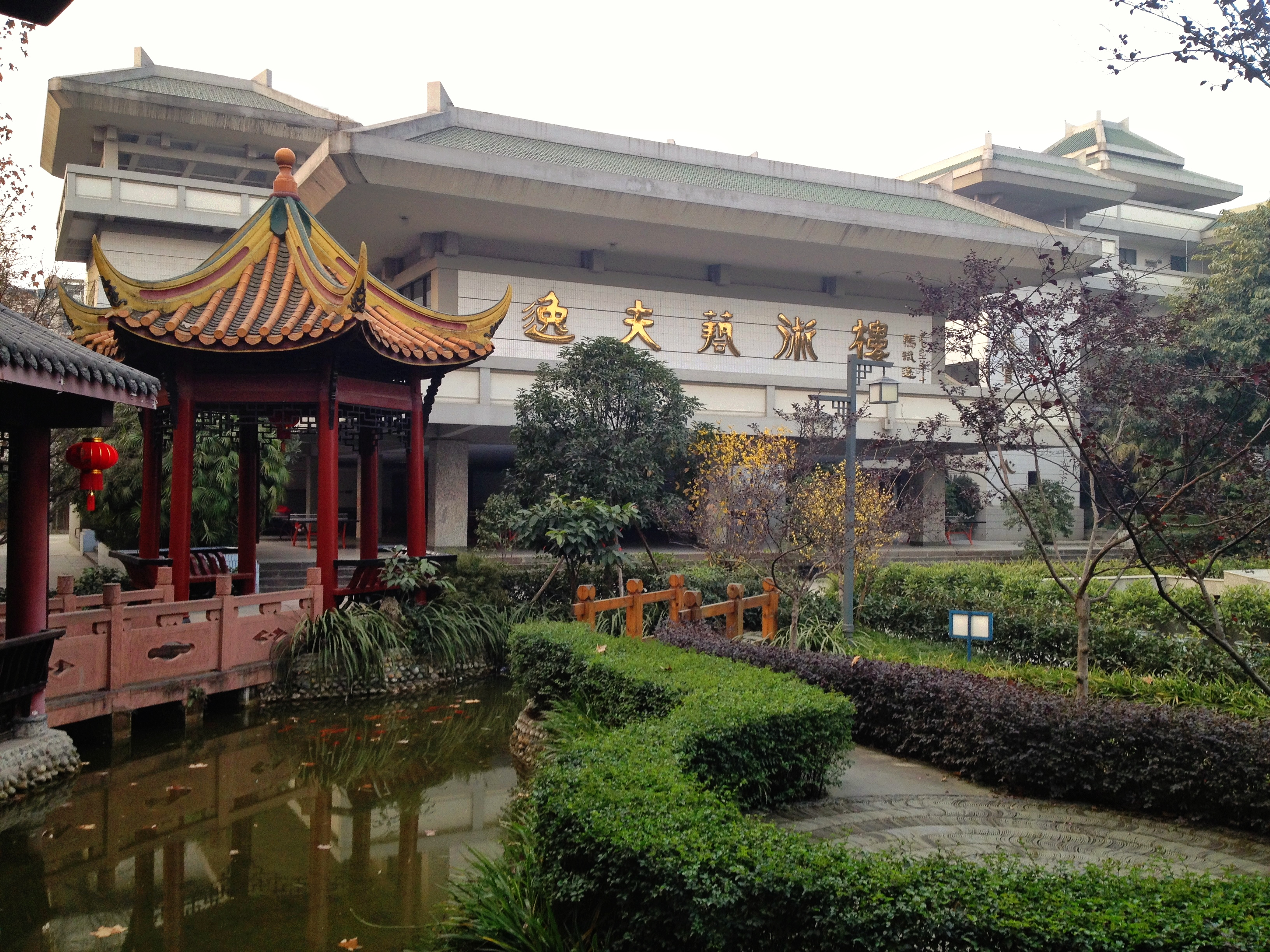 中文（中国大陆）: 石室中学校内的逸夫艺术楼。